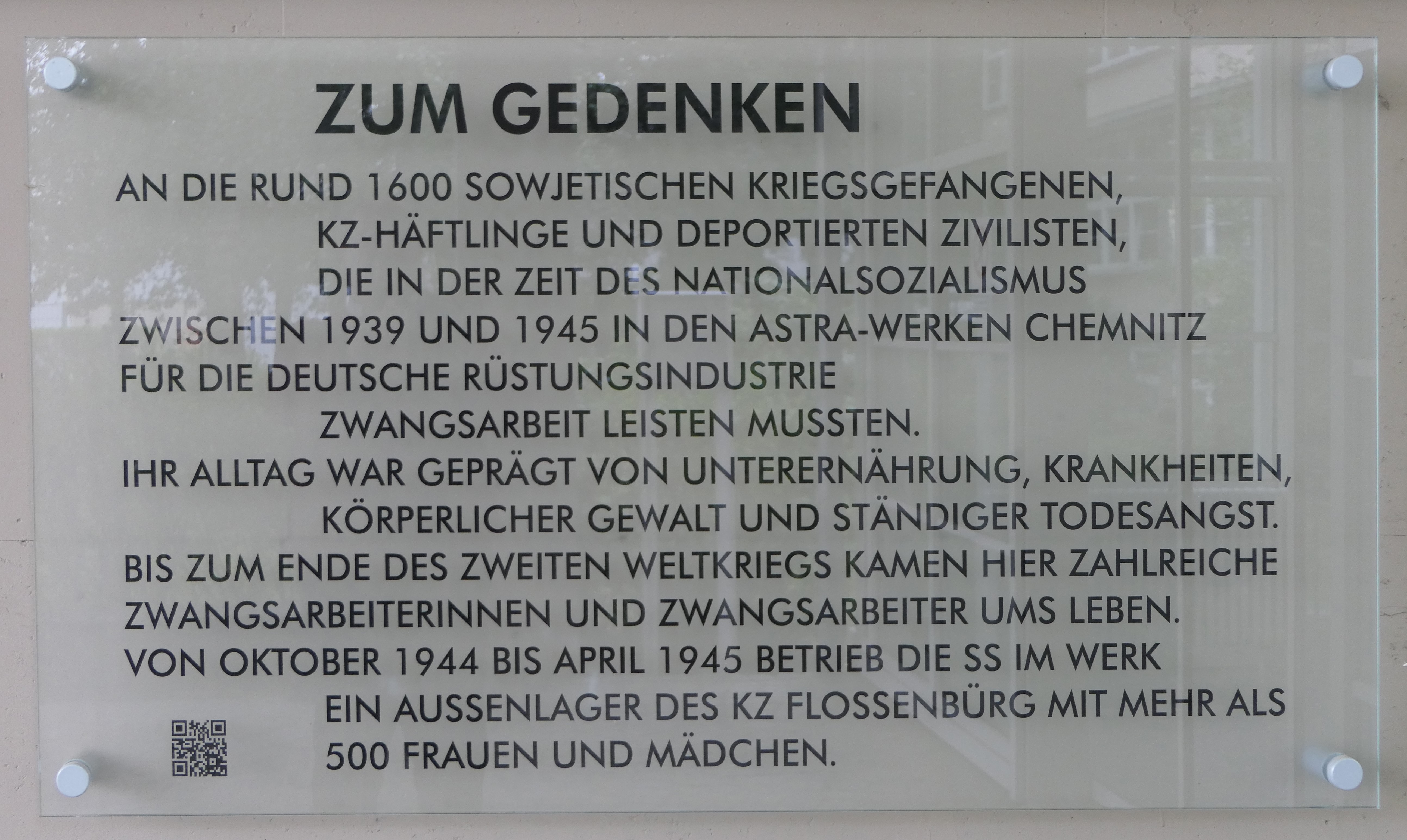 Gedenktafel für Zwangsarbeiter während der Zeit des Zweiten Weltkrieges am Eingang der ehemaligen Astra-Werke, Altchemnitzer Straße 41, Chemnitz